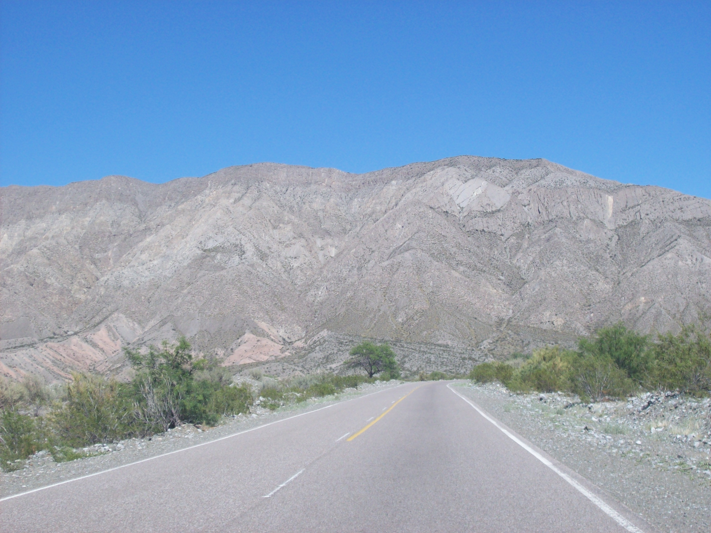 Ruta Provincial 436 en la Precordillera a pocos km al oeste de la Ruta Nacional 40 en Talacasto, departamento Ullum Provincia de San Juan, Argentina.